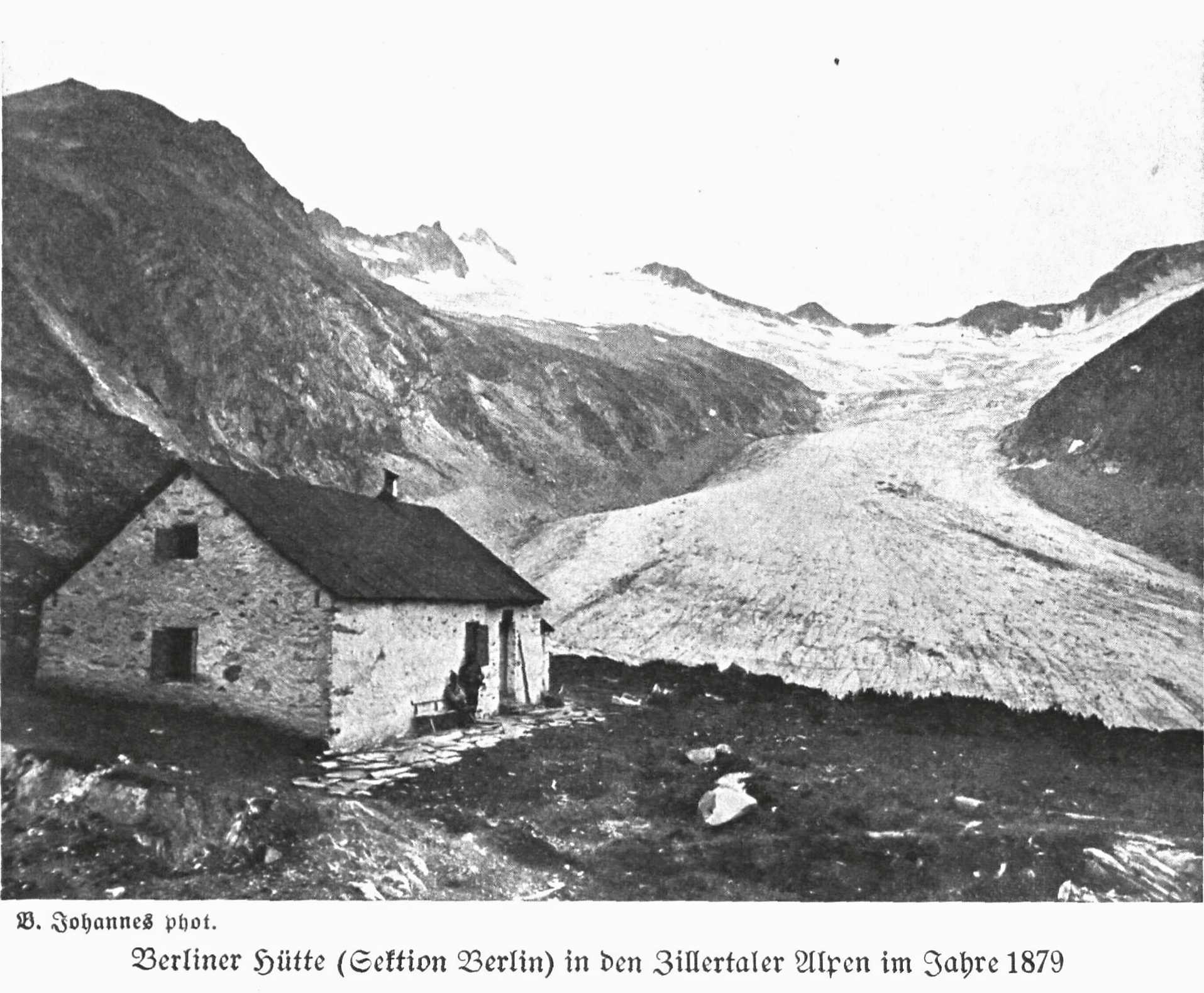 Berliner Hütte (Sektion Berlin) in den Zillertaler Alpen im Jahre 1879 aus Zeitschrift des Deutschen und Oesterreichischen Alpenvereins 1919 Band 50